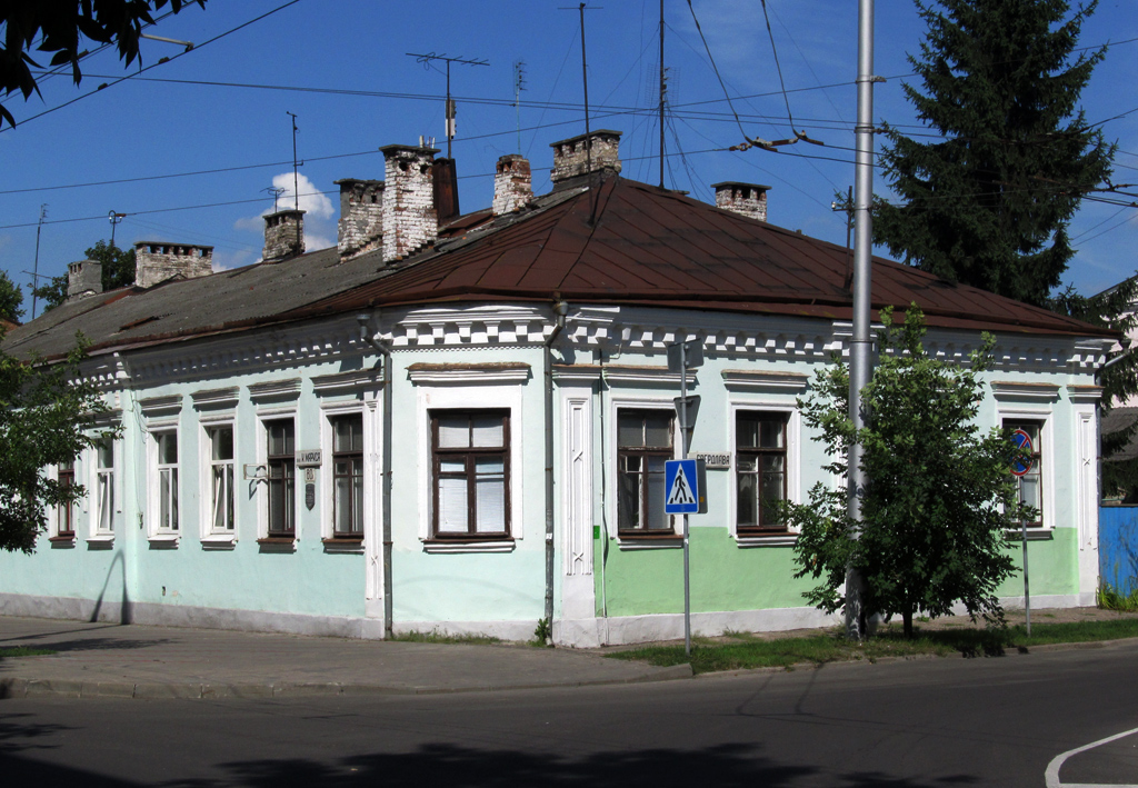 Брэст. Вуліца Карла Маркса, 80